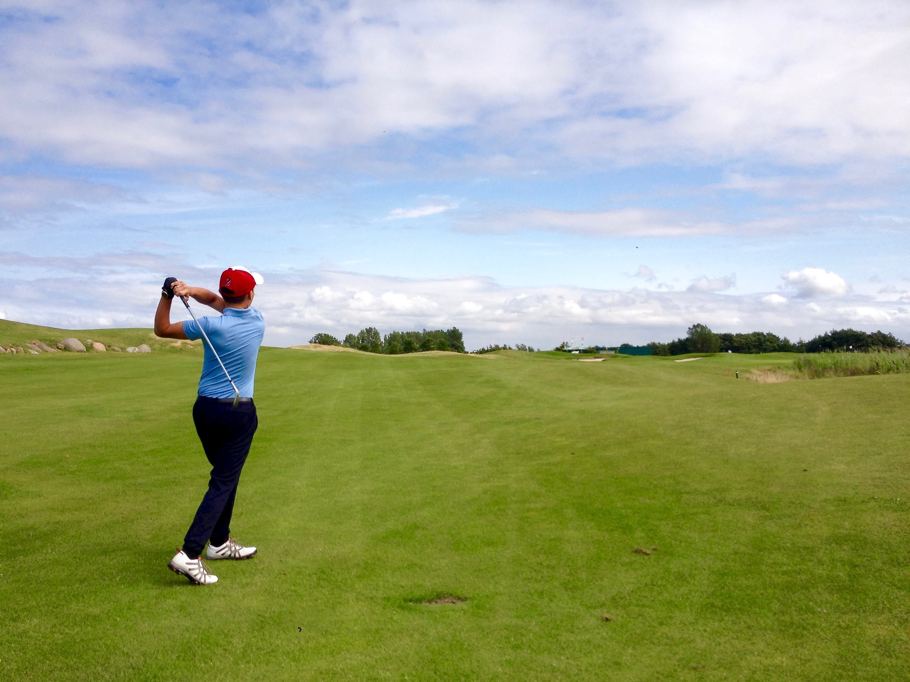 Golfplatz Wittenbeck